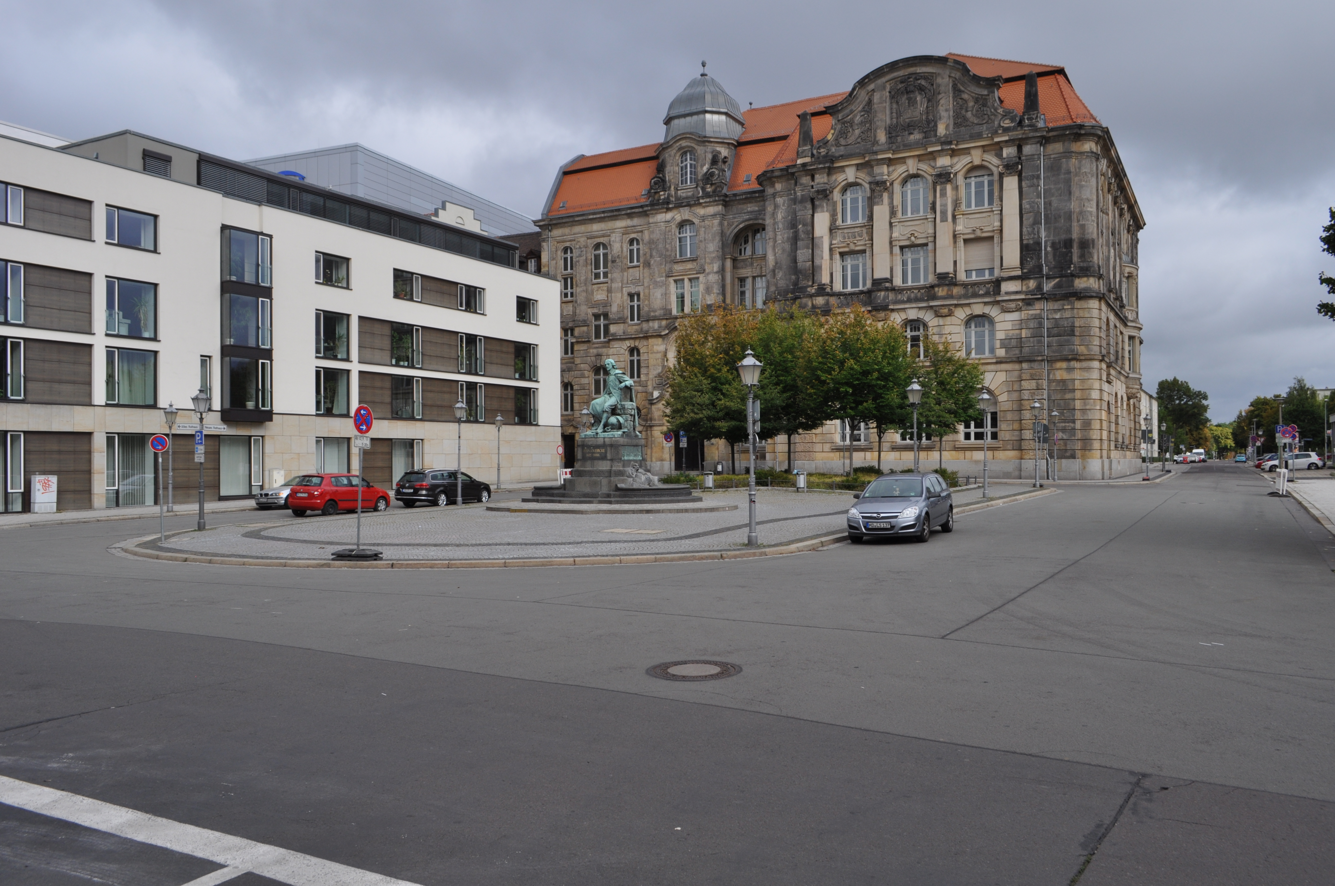 Platz Bei der Hauptwache in Magdeburg-Altstadt. Im Hintergrund das Neue Rathaus. This is a photograph of an architectural monument.It is on the list of cultural monuments of Magdeburg